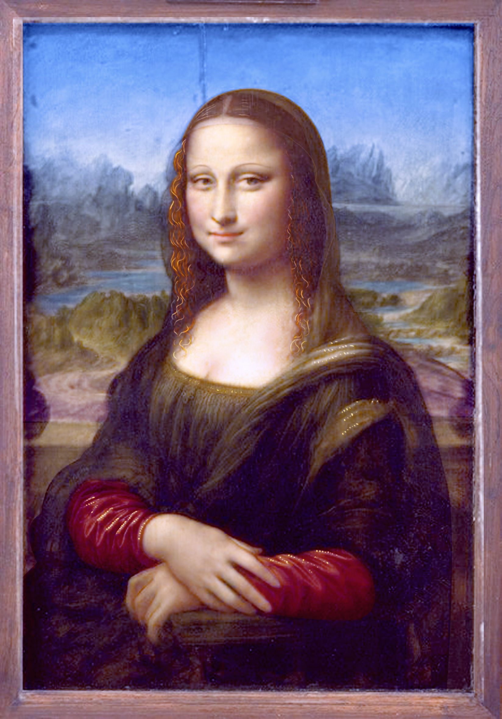 La_Joconde telle qu'aux premiers jours.jpg